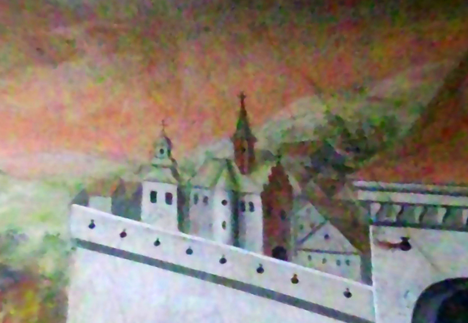 Катедра святого Івана Хрестителя з дзвіницею. Фрагмент розпису костелу францисканців у Перемишлі.